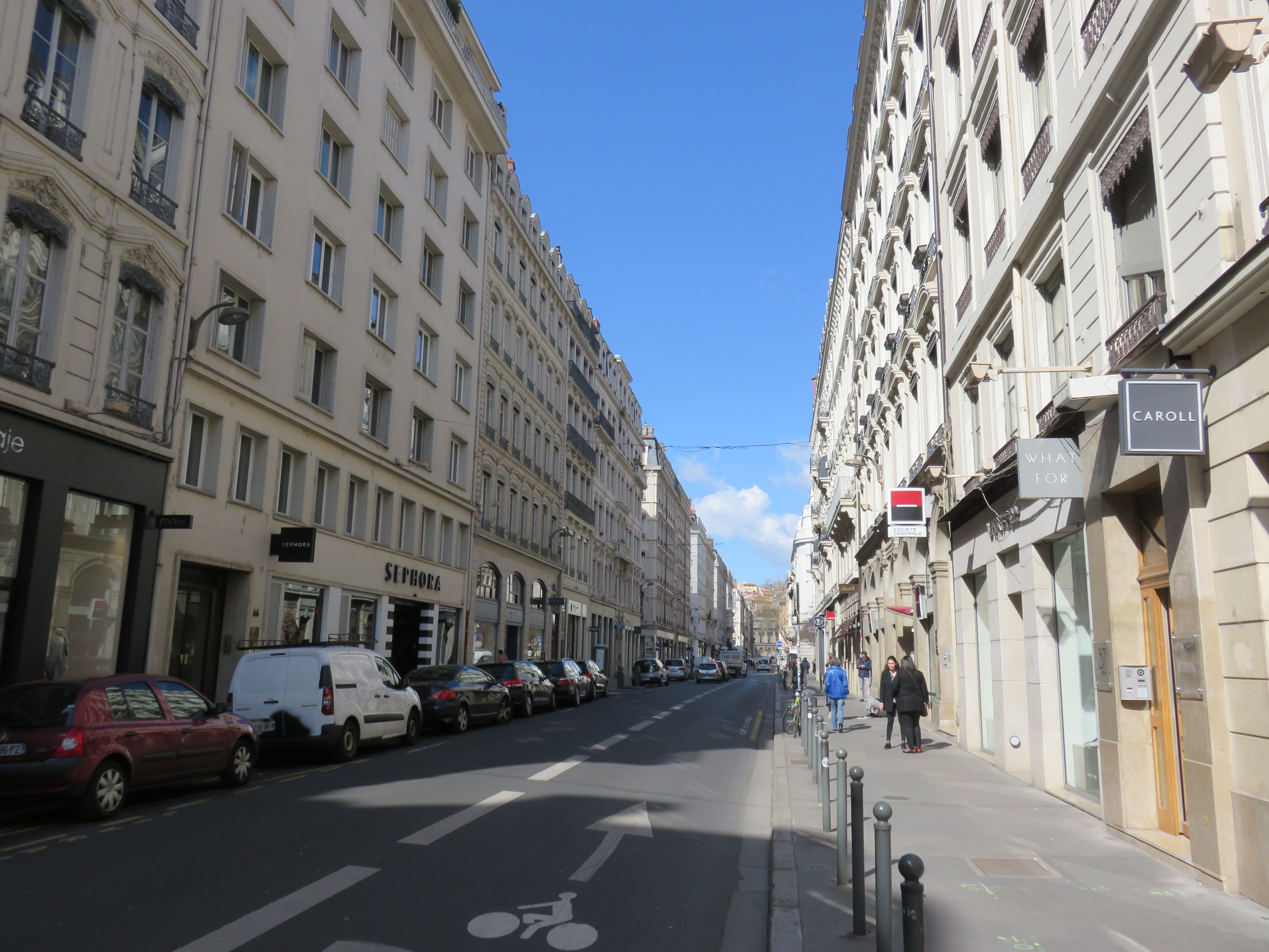 Vue de la rue du Président Édouard Herriot, au niveau de la rue Thomassin et en direction de la place des Terreaux, dans le 2e arrondissement de Lyon.